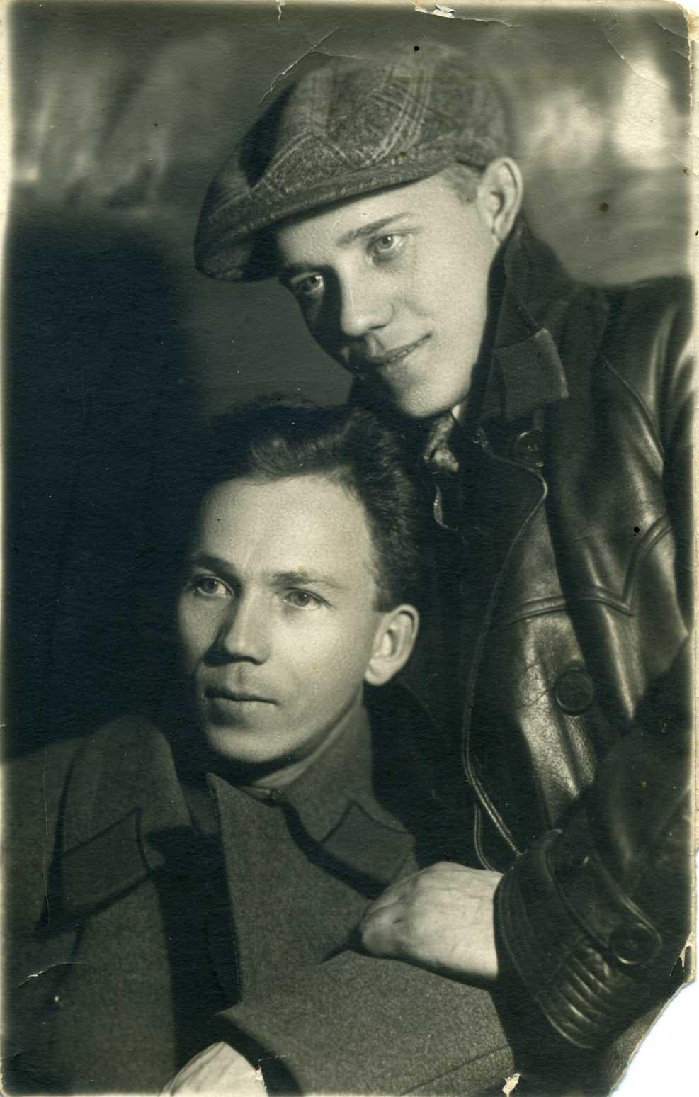 Фото двух работников ОГПУ. На обороте: «…писать о любви? Ты же знаешь меня… Поверь, что ты для меня заменяешь все, кроме жены. Возврата к прошлому быть не может, потому что слишком подло было бы это по отношению к тебе. А жизнь проживем, надеюсь, так тесно, как на этом фото. Май — 33 г. Николай».